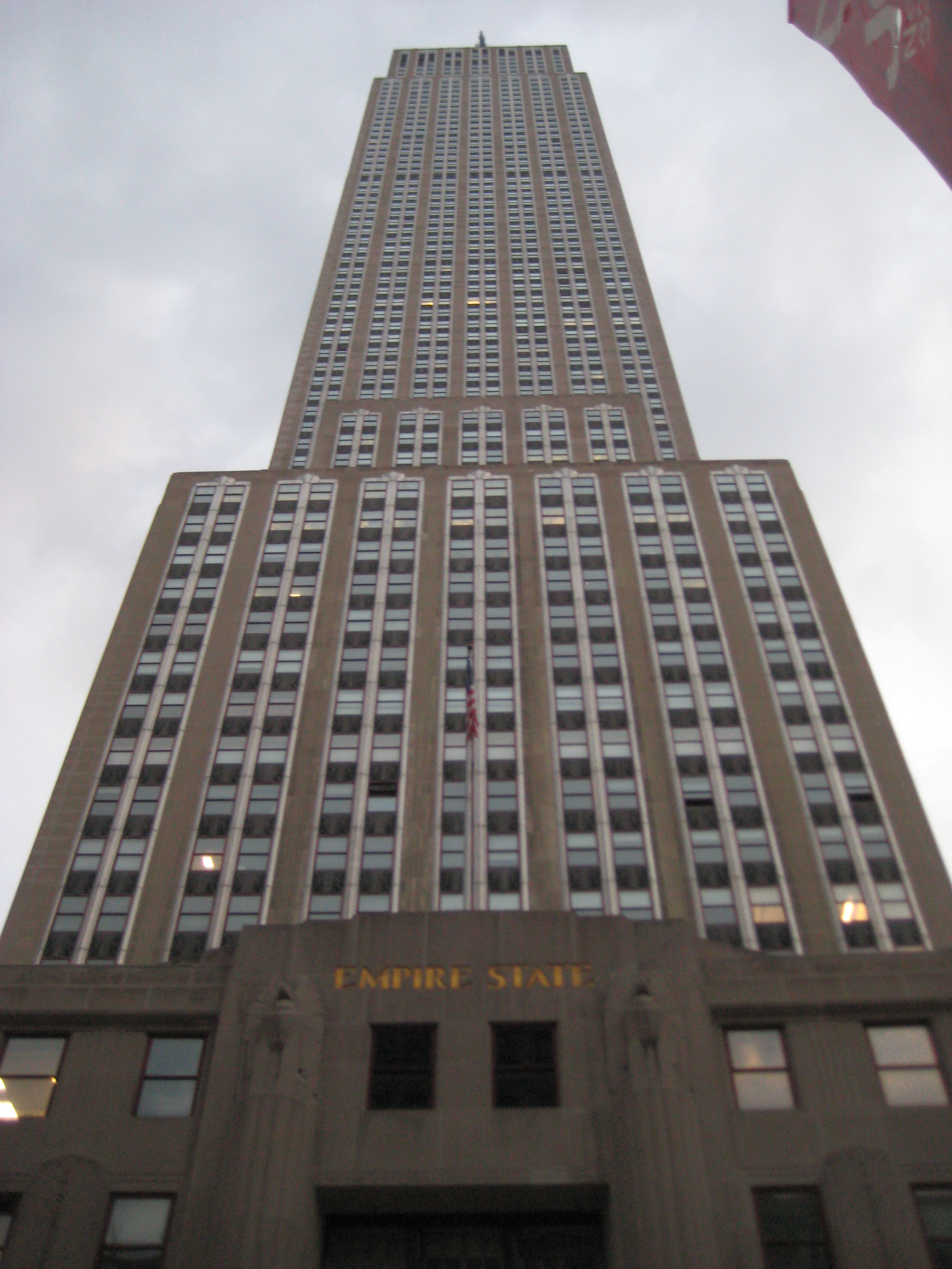 Empire State